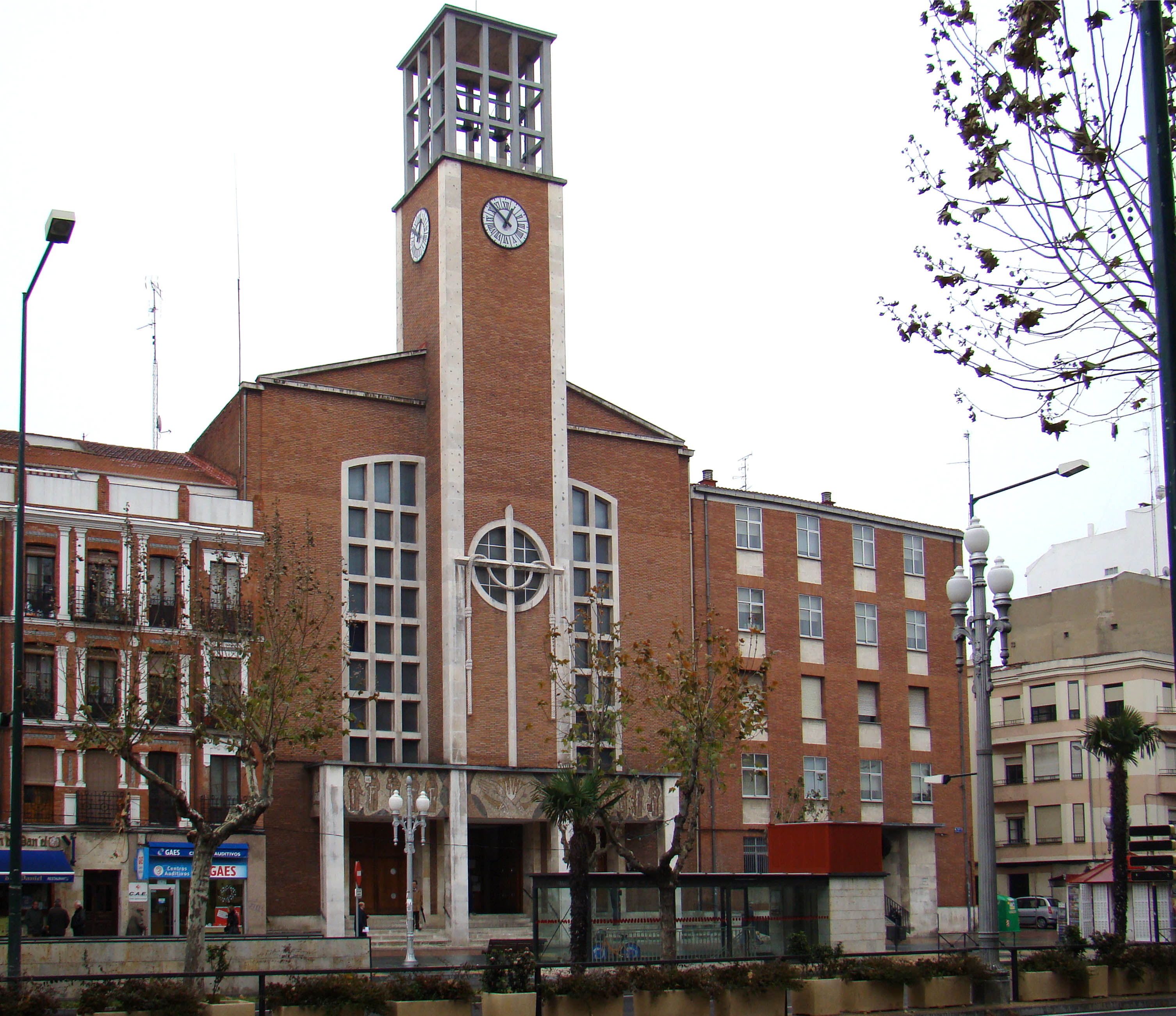 Iglesia-parroquia de la Purísima Concepción, de frailes franciscano, situada en el Paseo e Zorrilla de Valladolid (España)